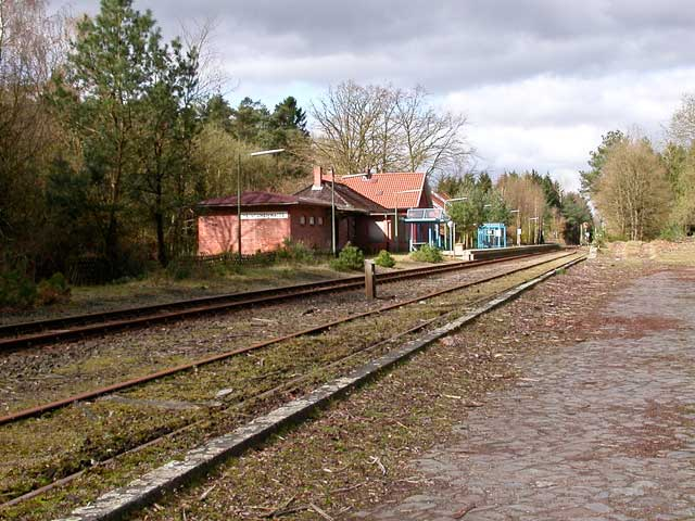 BHF-Heinschenwalde